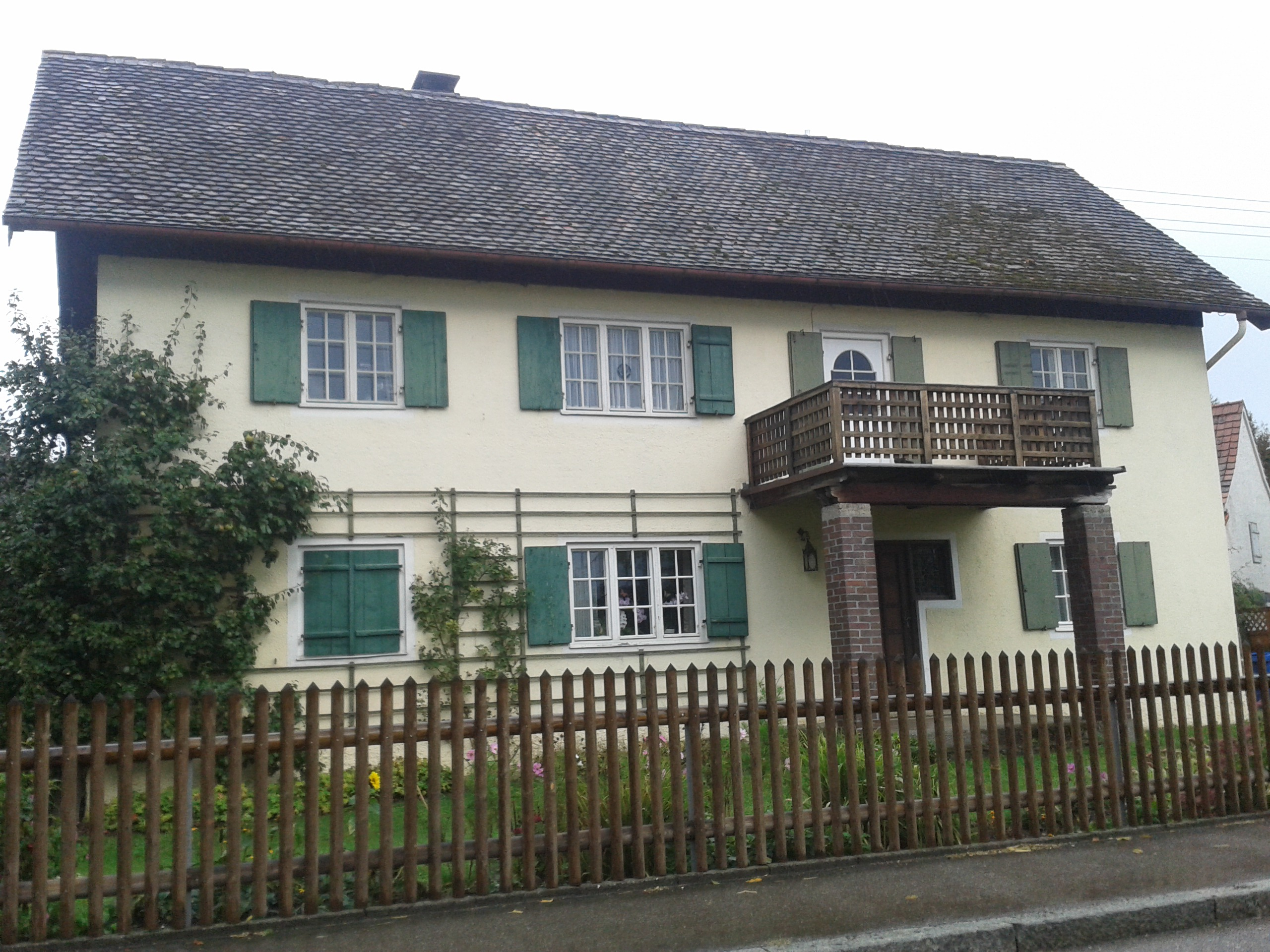 Sog. Villa Löwenhauser in Tannheim neben Gasthaus Grüner Baum in der Leutkircher Straße